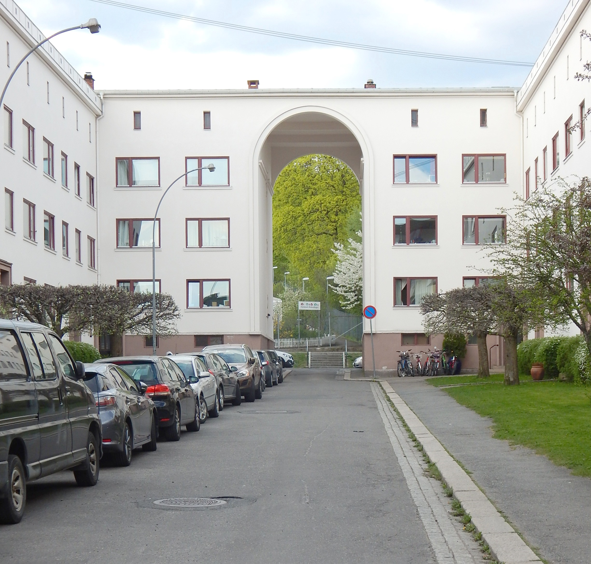 Tønsberggata nordover mot Bjølsenparken